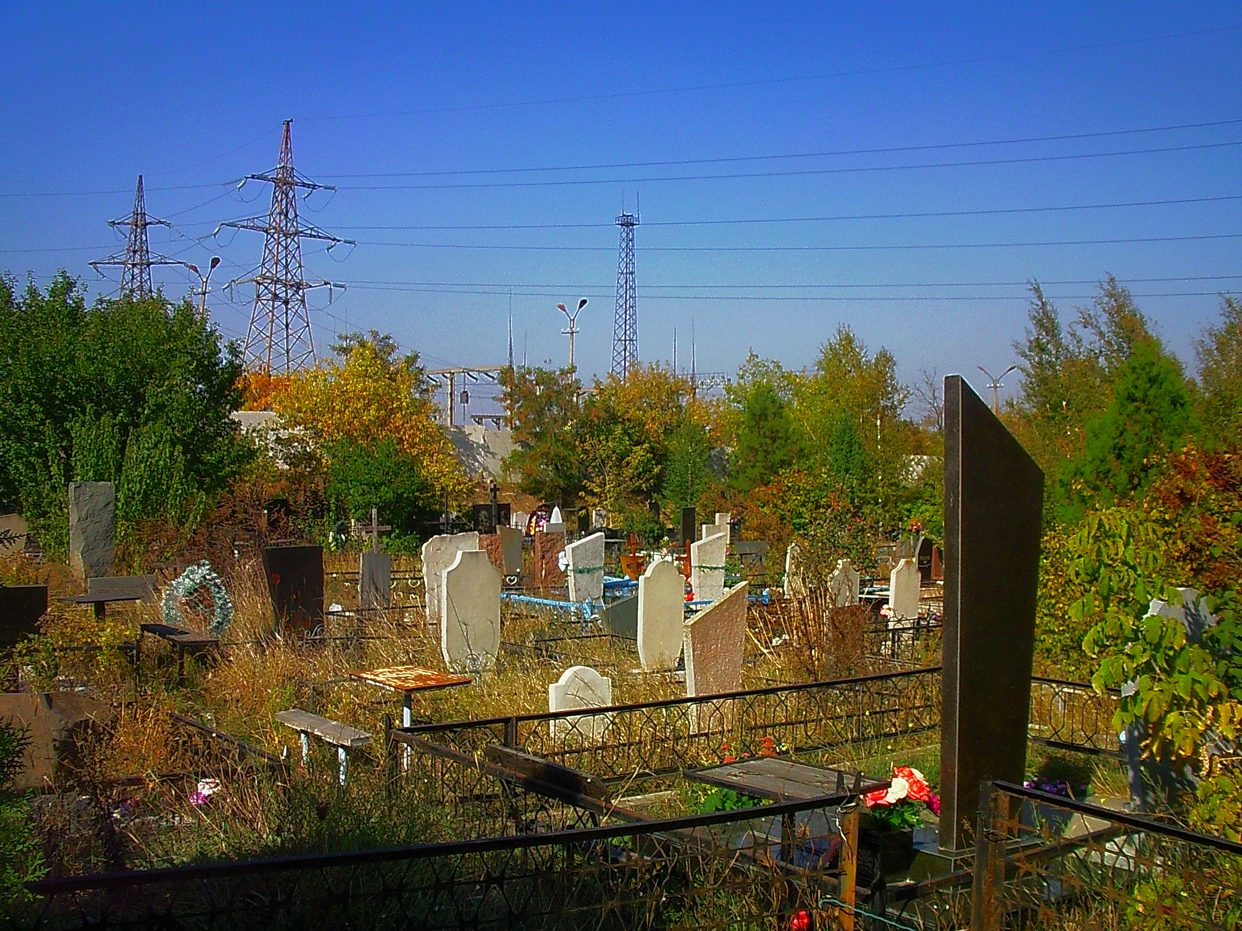 Кладбище